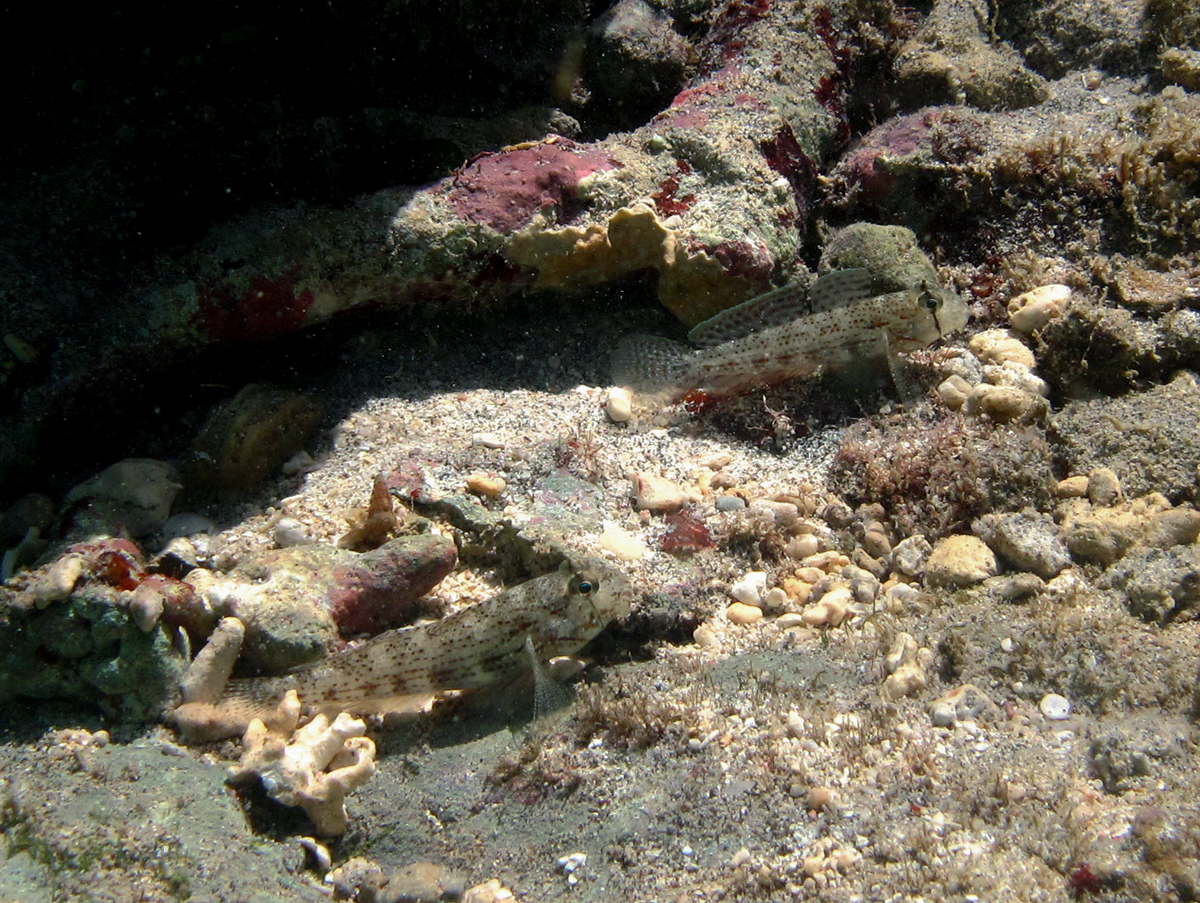 Un gobie à oeil rayé (Gnatholepis anjerensis) à la Réunion.